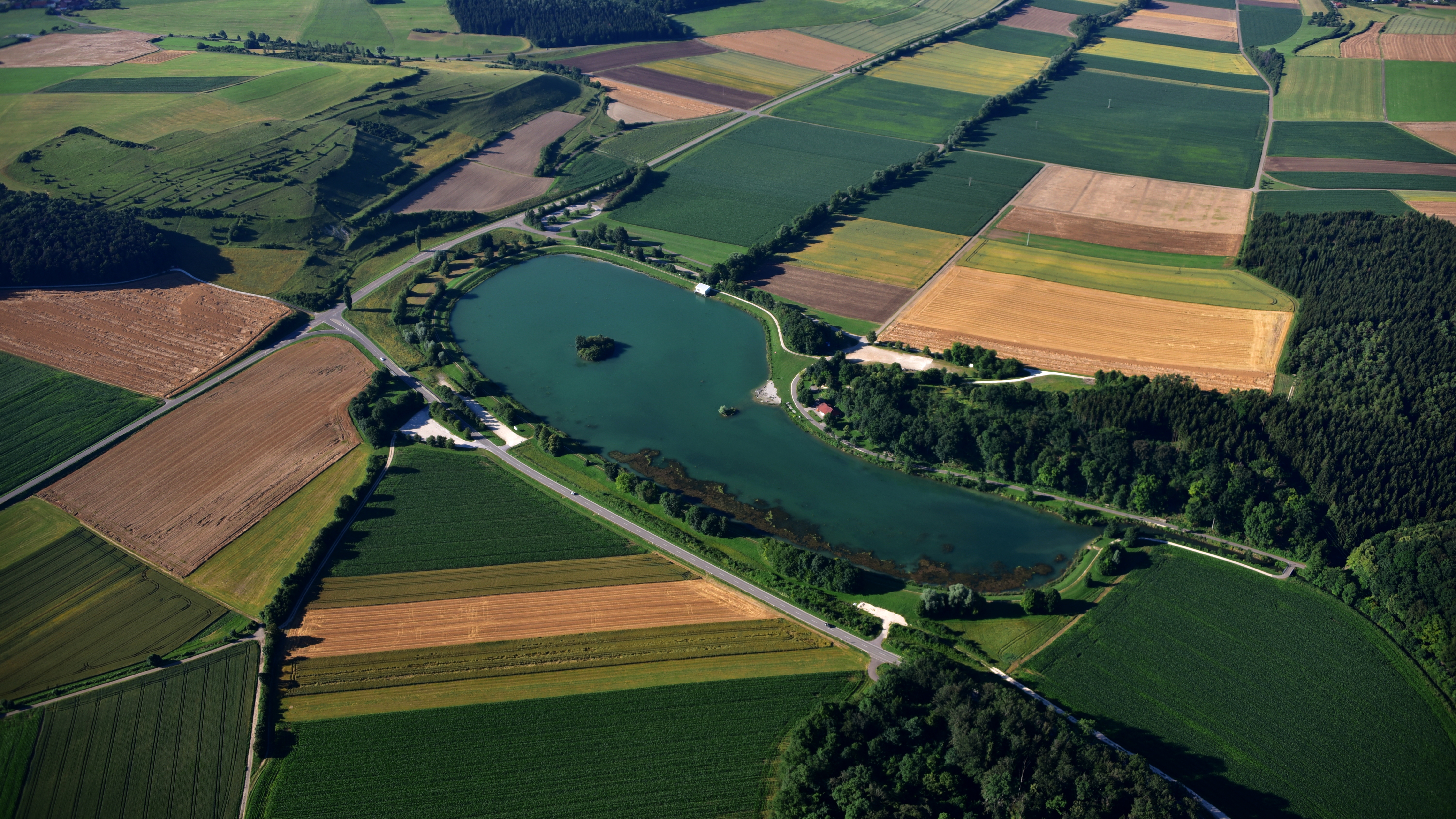 Härtsfeldsee, Luftaufnahme (2016)